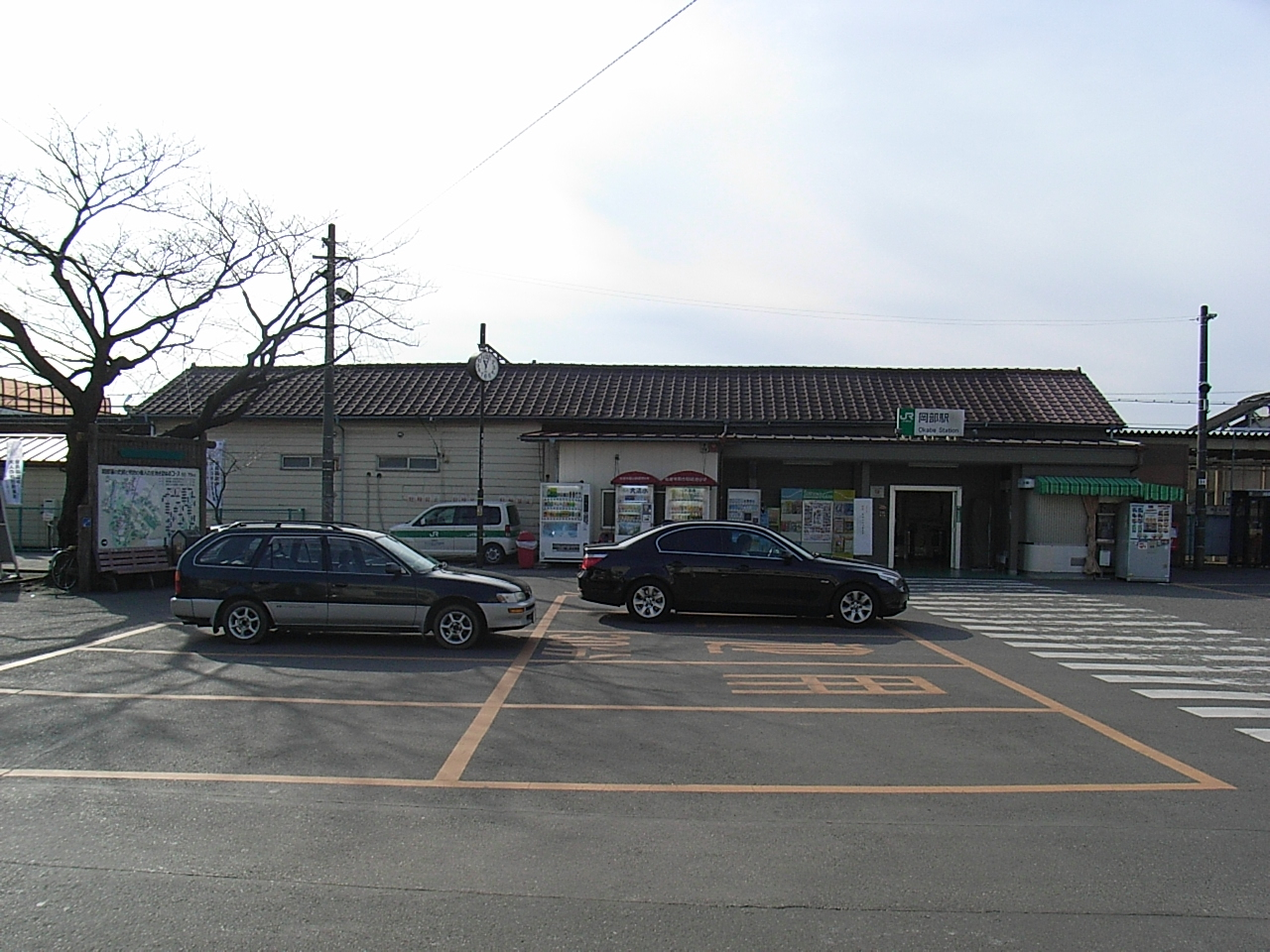 Okabe Station on JR Takasaki Line. (2661-3,Oka,Fukaya-shi,Saitama-ken,JAPAN)